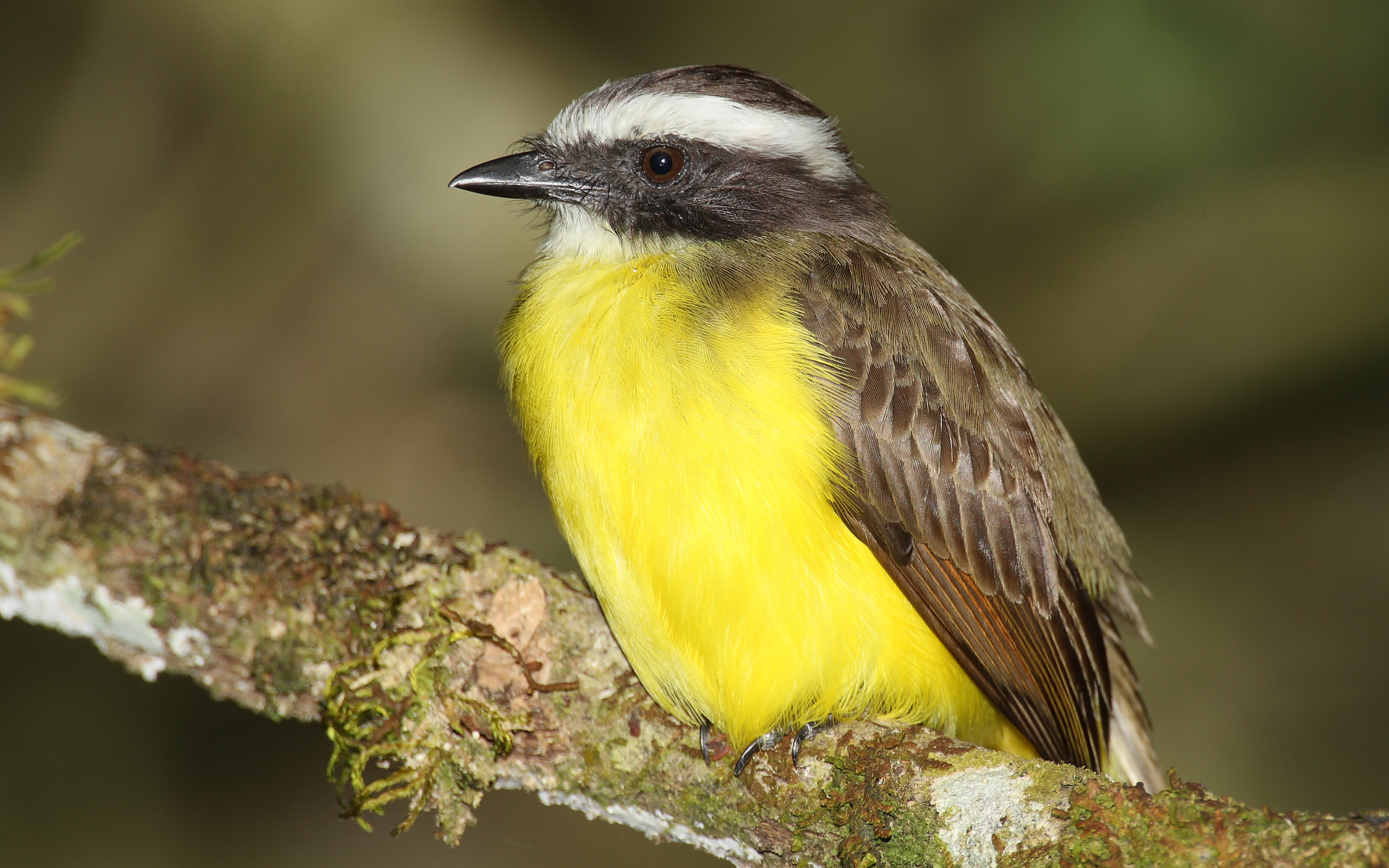 Social Flycatcher (Myiozetetes similis columbianus) -- Parque Nacional Darién, Panama -- 2008 February